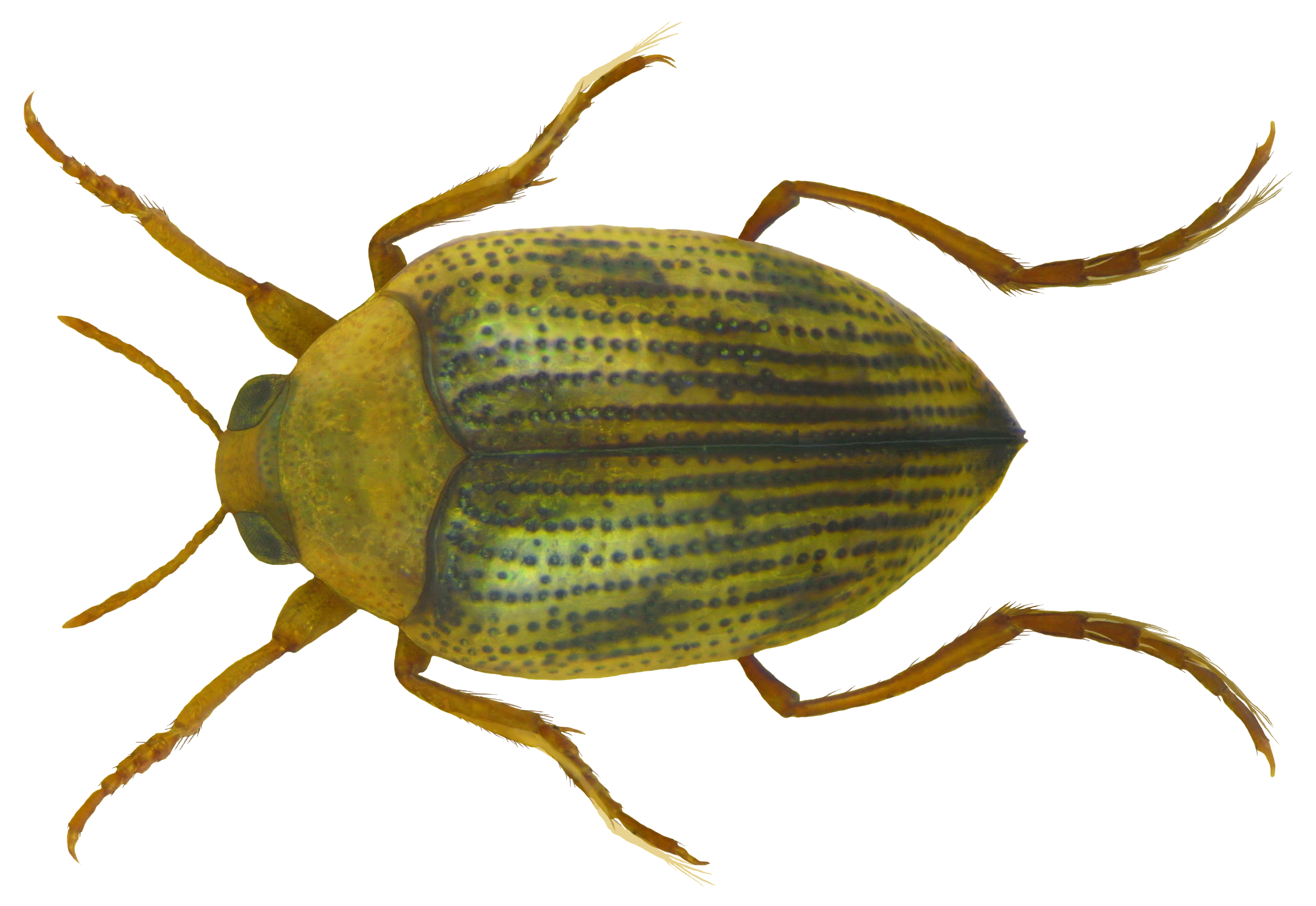 Haliplus ruficollis (DeGeer, 1774) Familie: Haliplidae Groesse: 2,5-2,9 mm Verbreitung: Europa bis Asien Ökologie: in ruhig fliessenden oder stehenden Gewässern, Pflanzenfresser Fundort: Germania, Bayern, Oberfranken, Selbitz leg.det. U.Schmidt, 1973 Photo: U.Schmidt, 2008